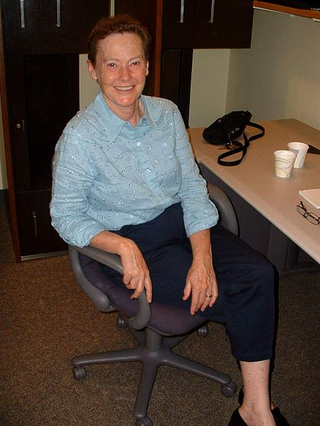 Helen Quinn na Universidade Harvard